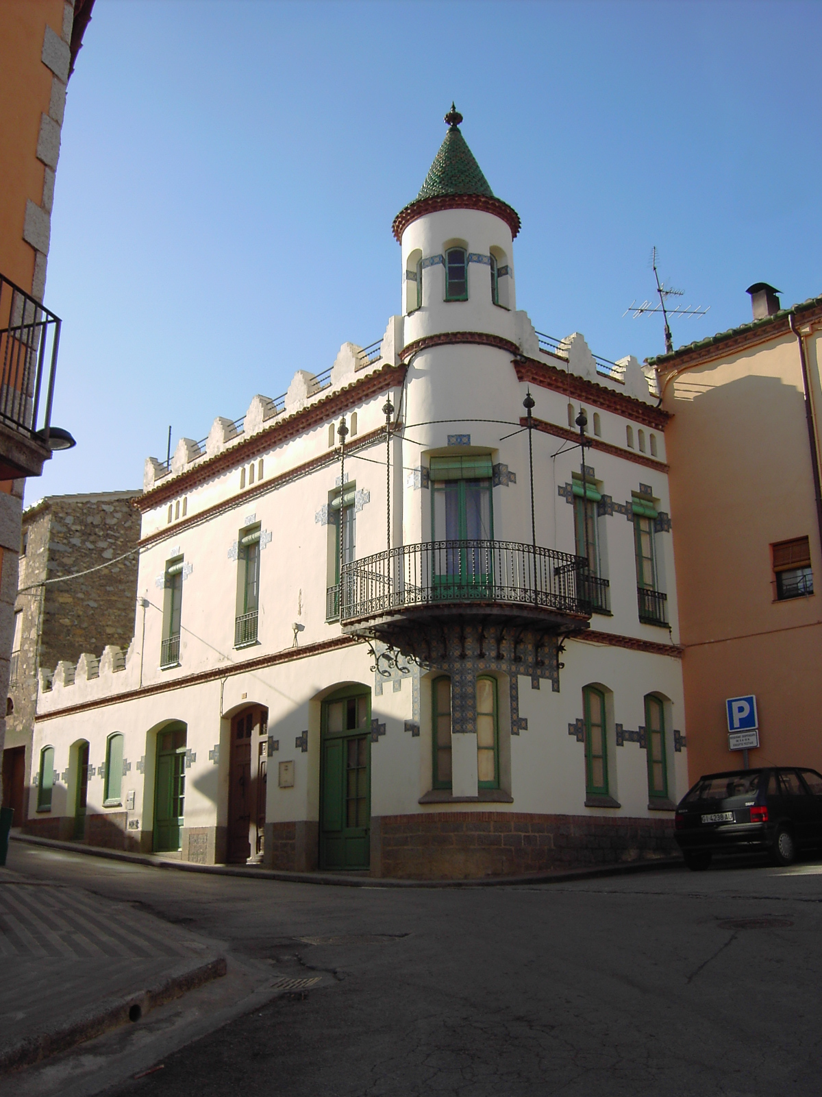 Casa Estela (1911), edificio modernista en Agullana (Alto Ampurdán, Gerona).